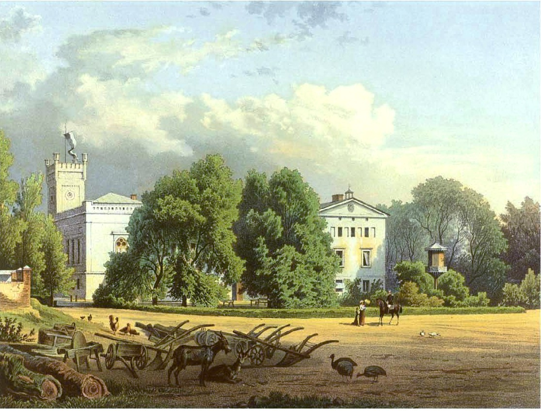 Schloss Gallowitz, Kreis Breslau, Provinz Schlesien